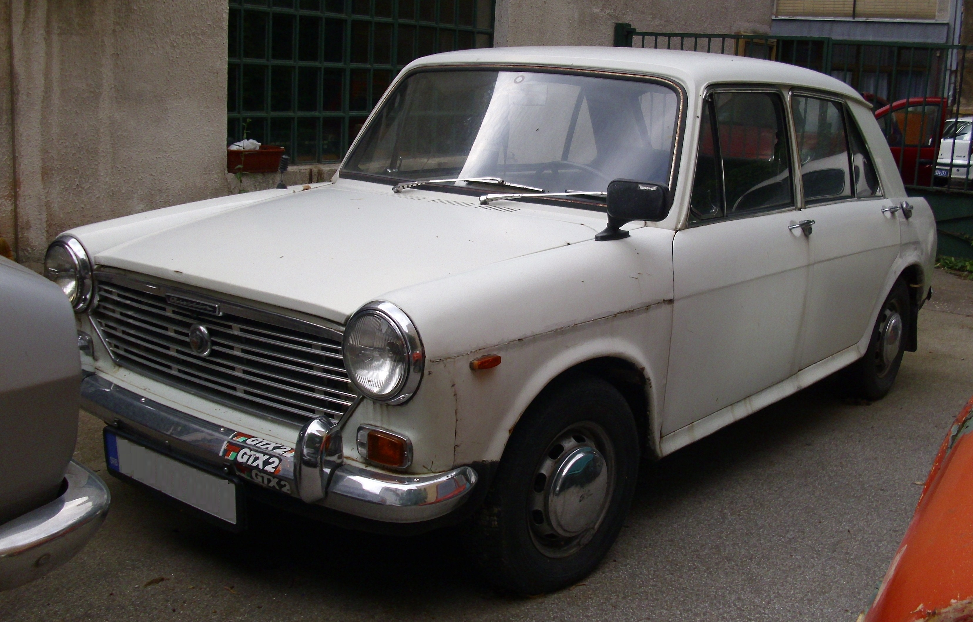 Austin 1300, vermutlich produziert von IMV, im Muzej automobila in Belgrad.